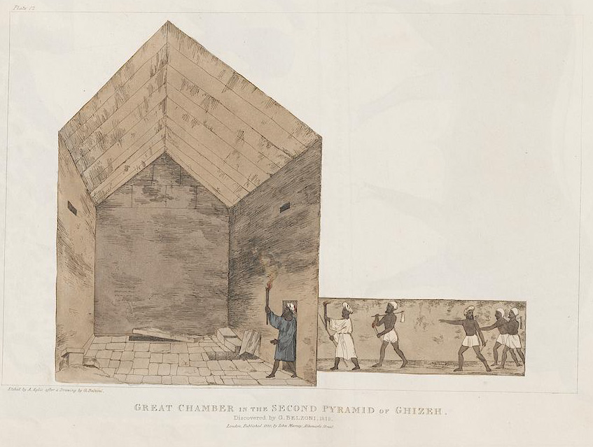 Komora grobowa w piramidzie Chefrena